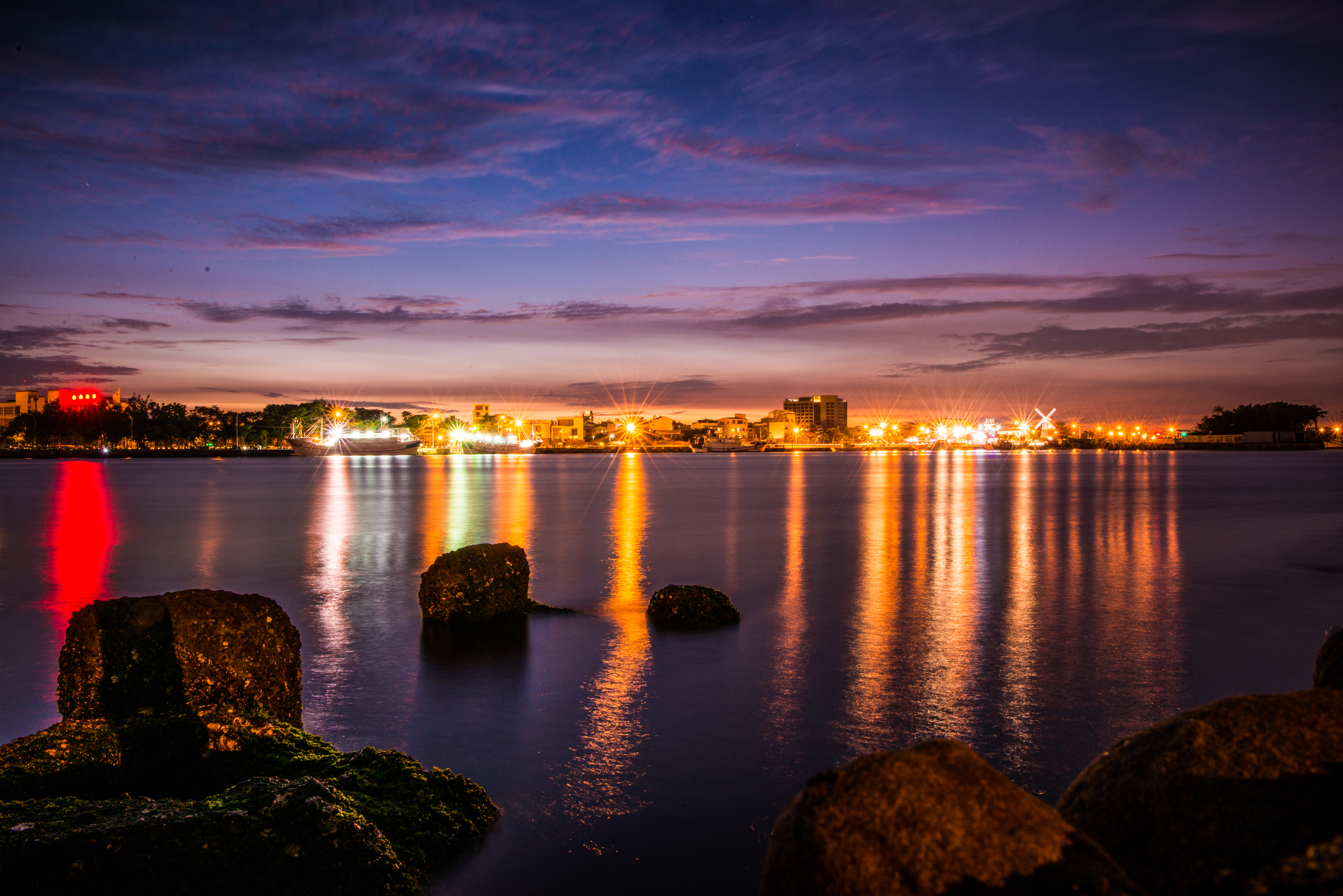 林默娘公園